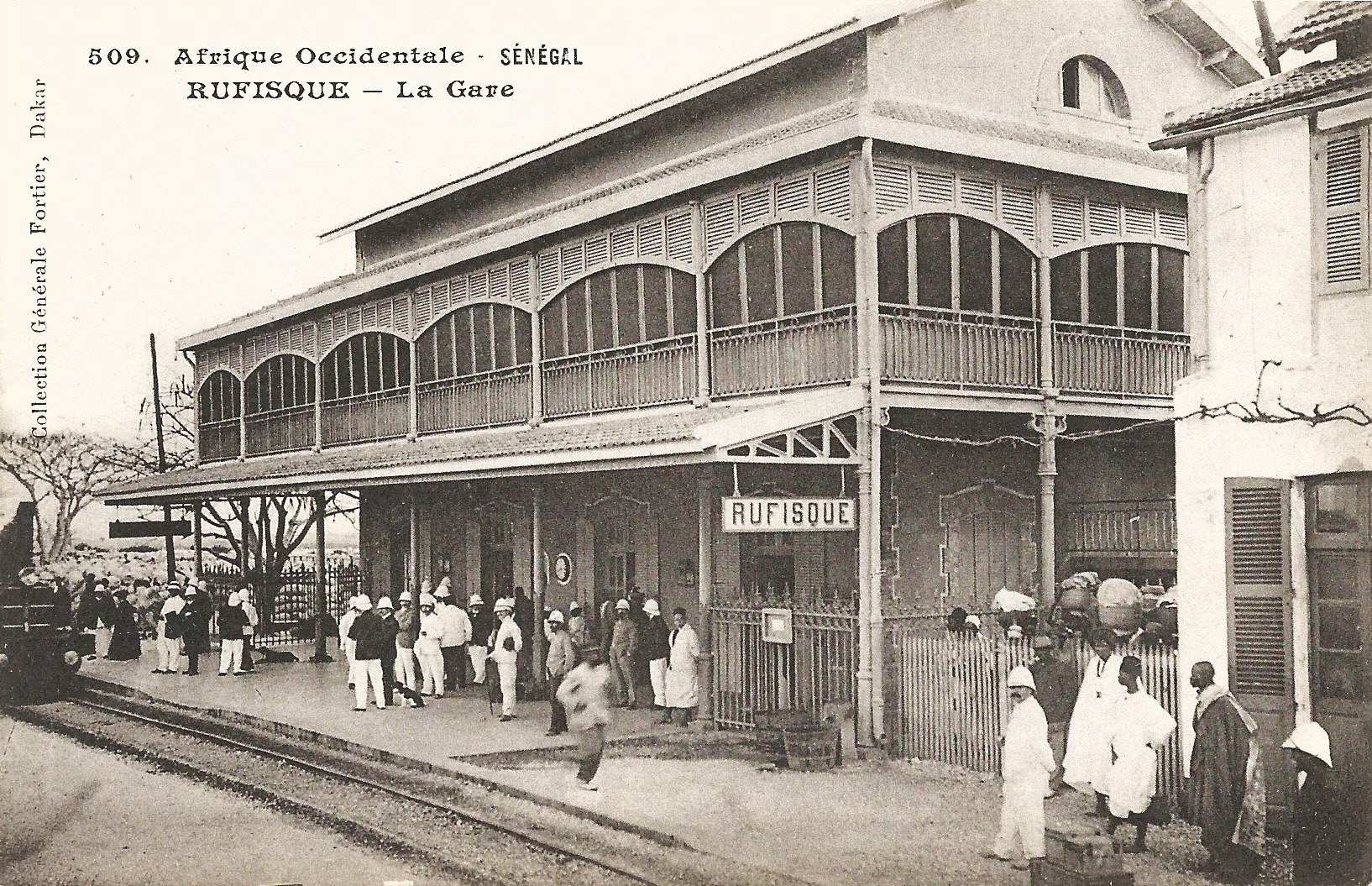 François-Edmond Fortier, Rufisque. La Gare. Afrique Occidentale - Sénégal.